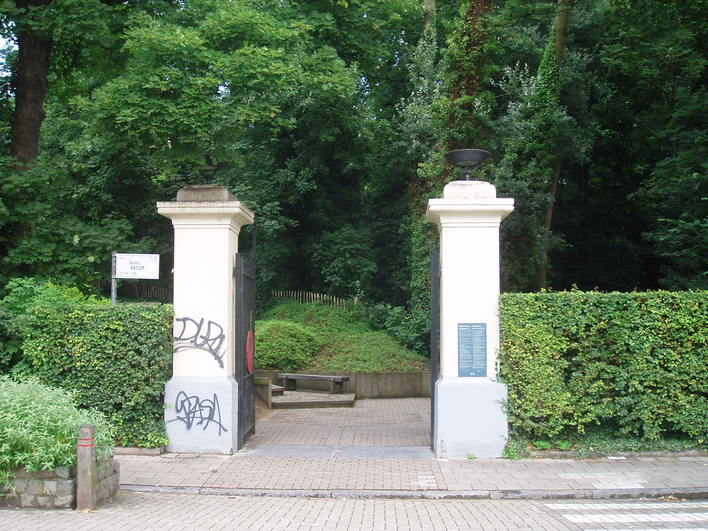 parc Bergoje entrée côté rue Jacques Bassem Auderghem Belgium